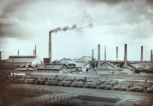 Historische Ansicht der Westfalenhütte Dortmund